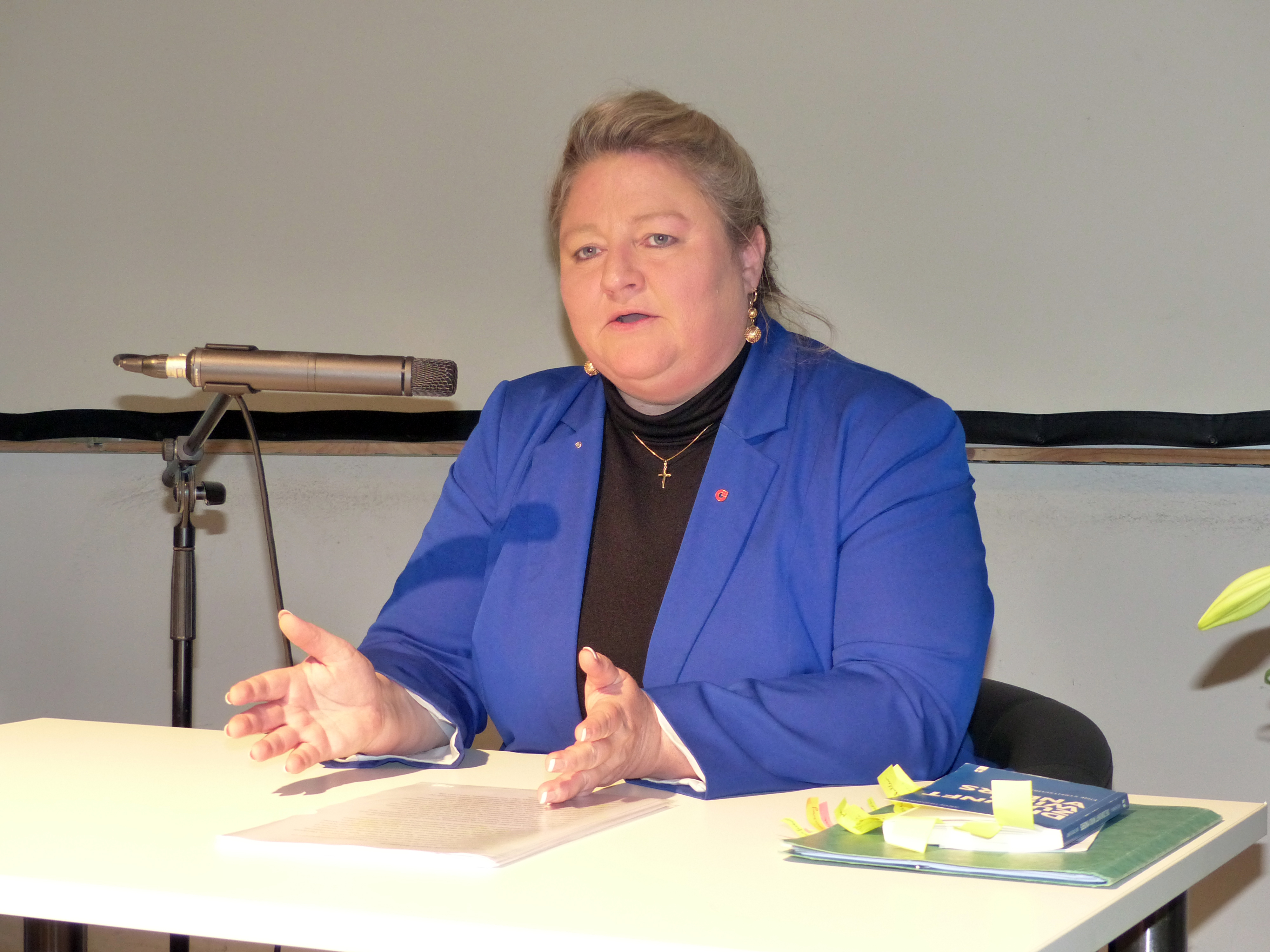 Buchlesung von Antje Hermenau in Dresden am 22. November 2015